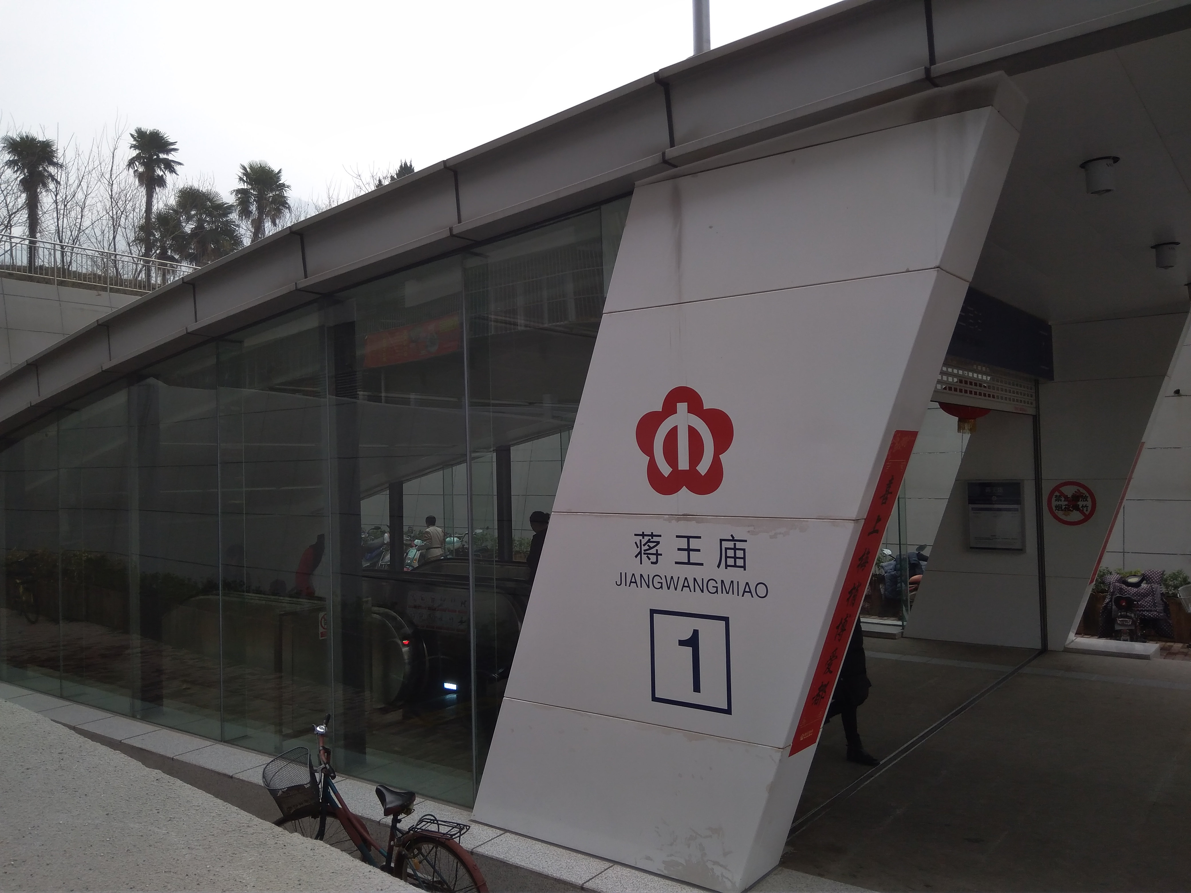 蒋王庙站1号口